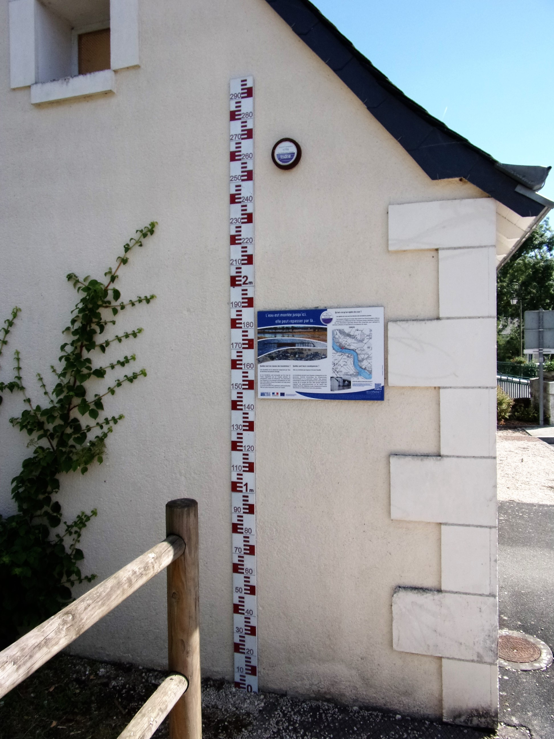 Repères de hauteur de crues à Courçay